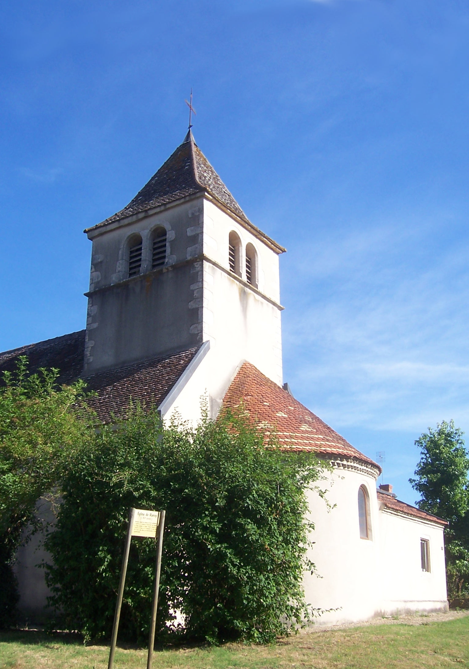 Version retouchée de File:RancyChurch.JPG : coin noir enlevé, image redressée.